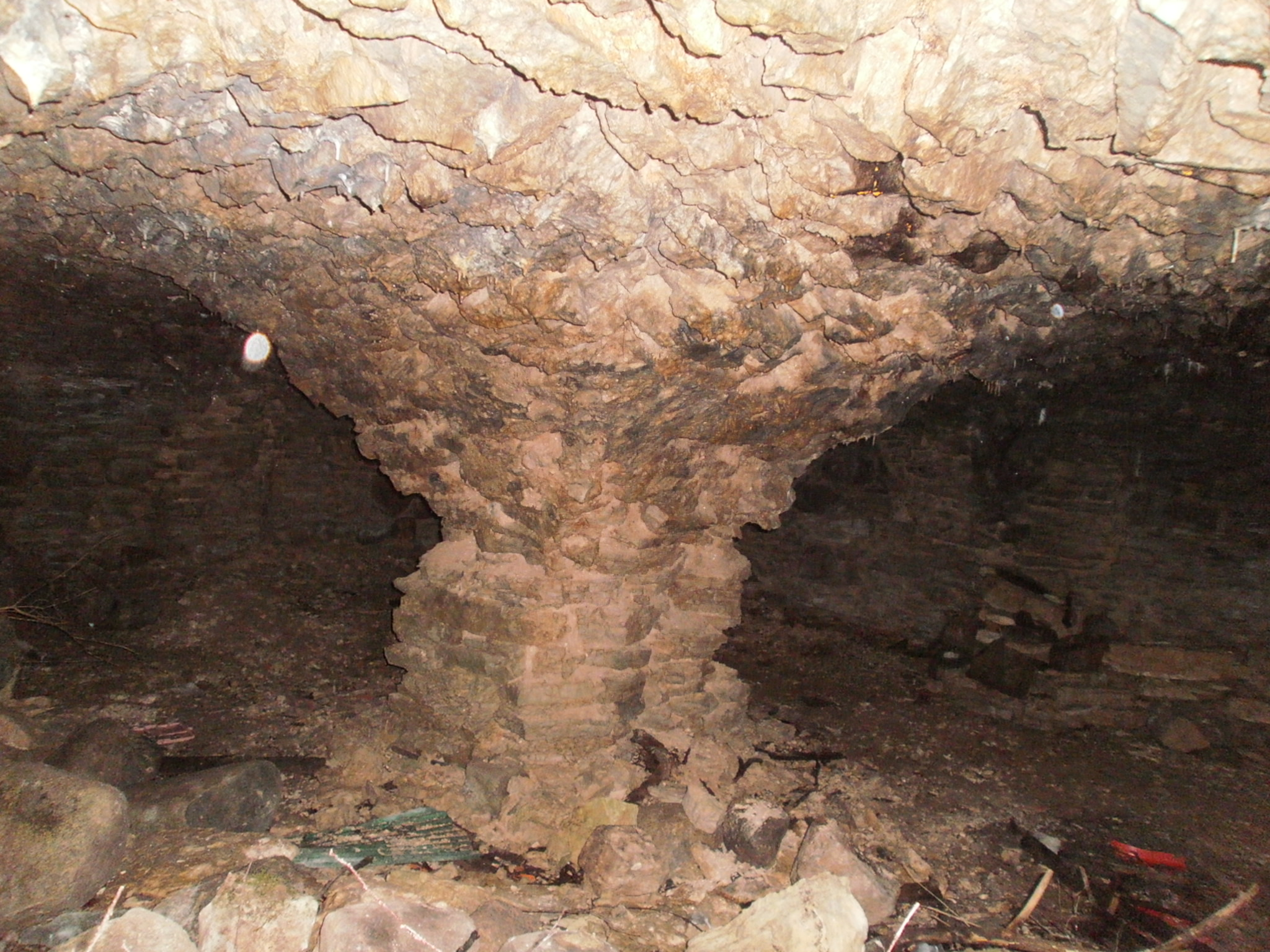 Keldri võlvlae keskne tugisammas.